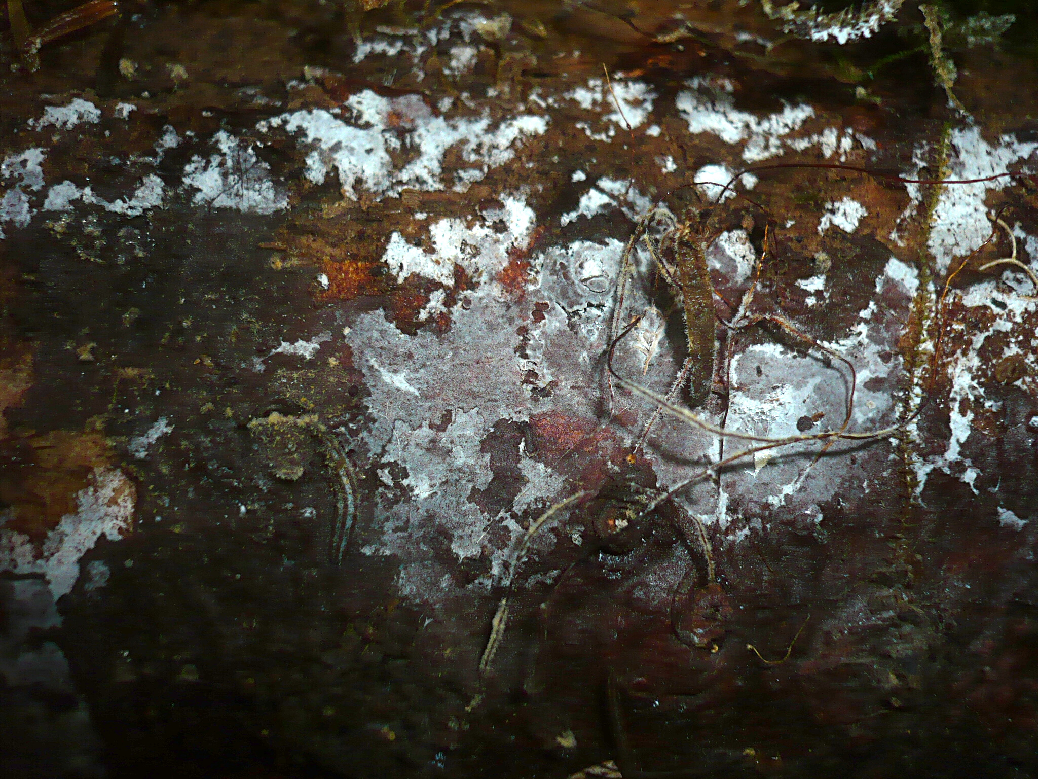 Boidinia furfuracea (Bres.) Stalpers & Hjortstam